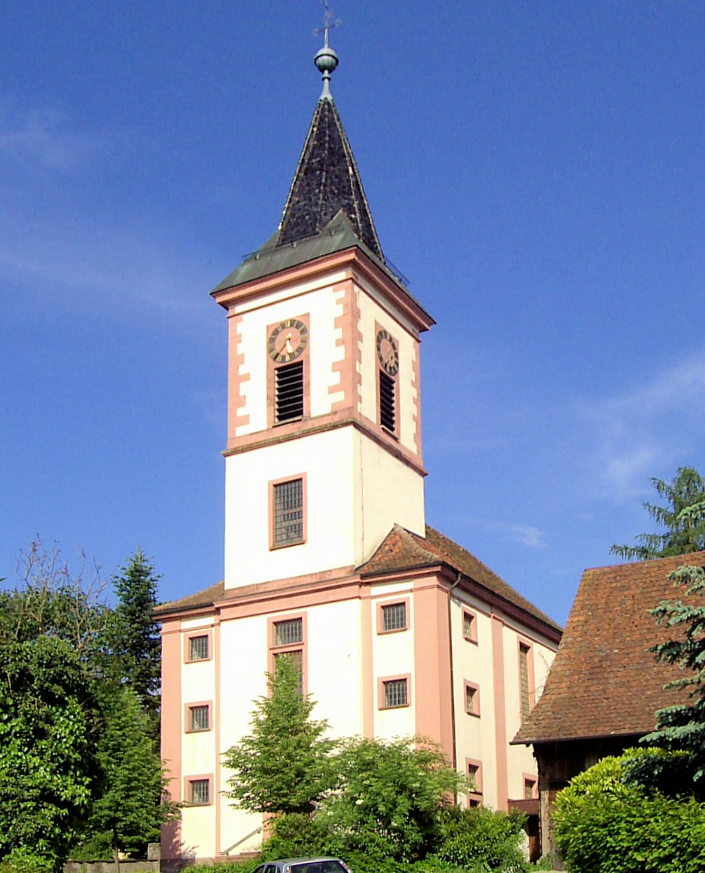 Kirche St. Michael in Wittlingen, Baden-Württemberg, Deutschland